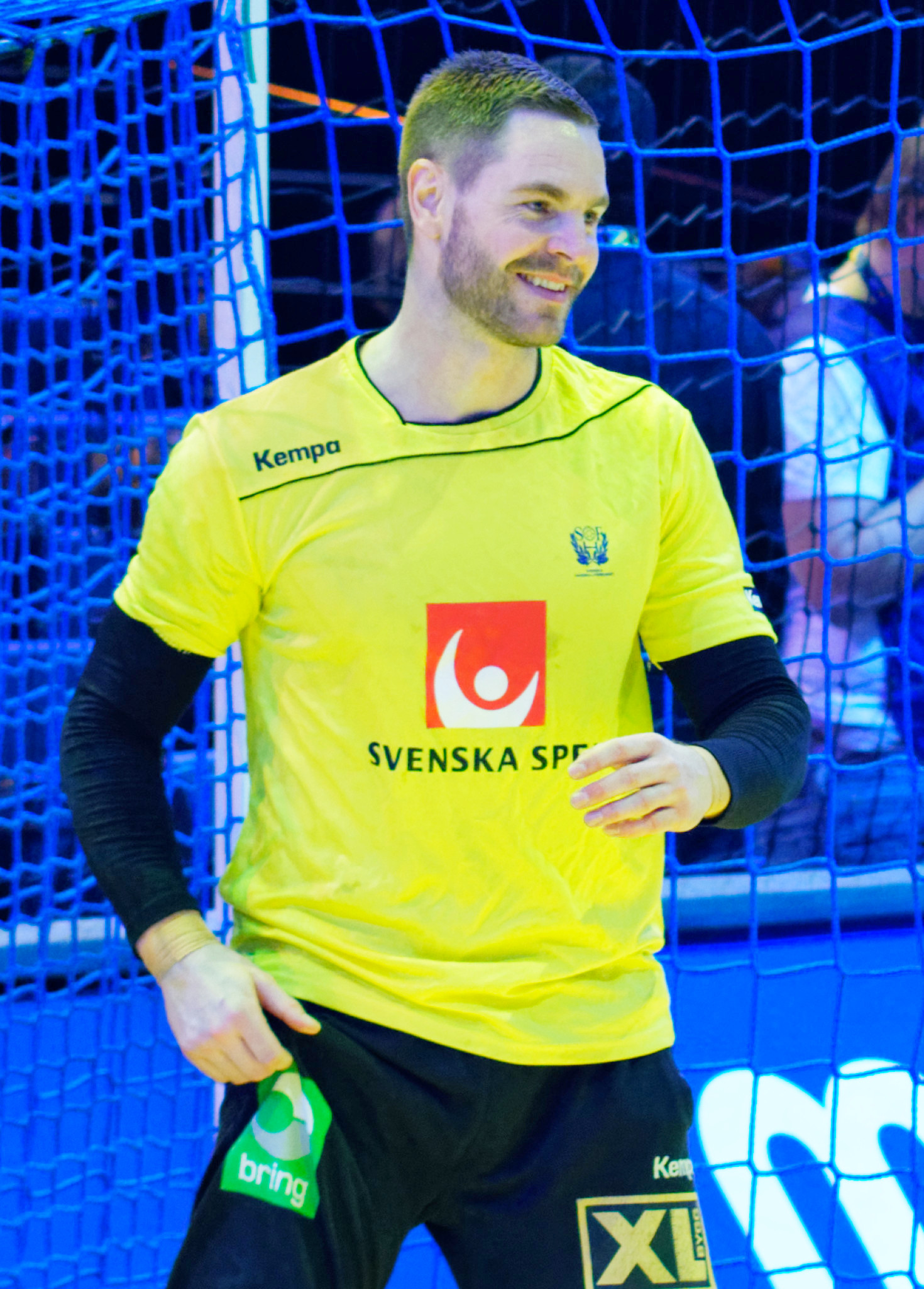 Match de la phase préliminaire du championnat du monde masculin de handball 2017 entre la Suède et le Danemark (Groupe D). A Bercy, le 16 janvier 2017.